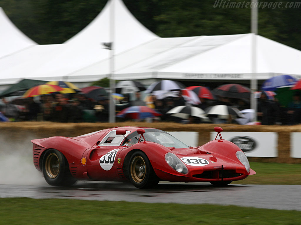 Ferrari-330-P3